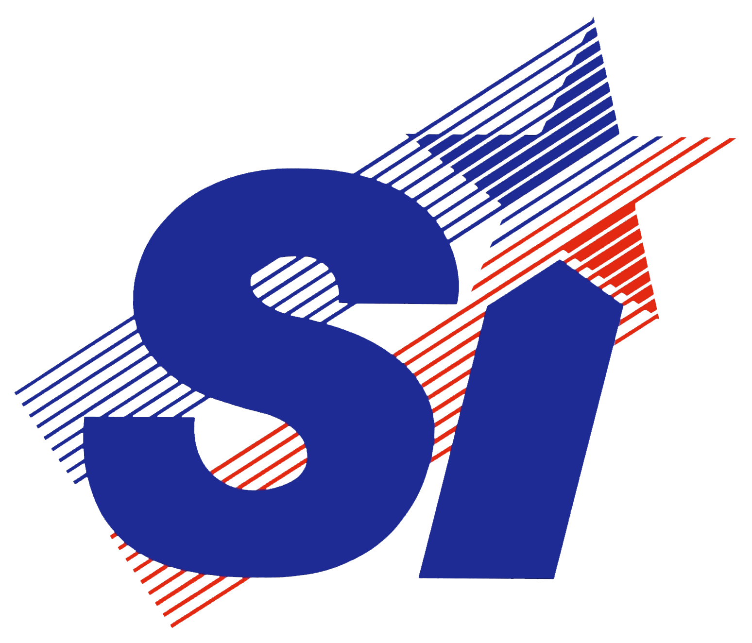 Logo de la campaña de Pinochet